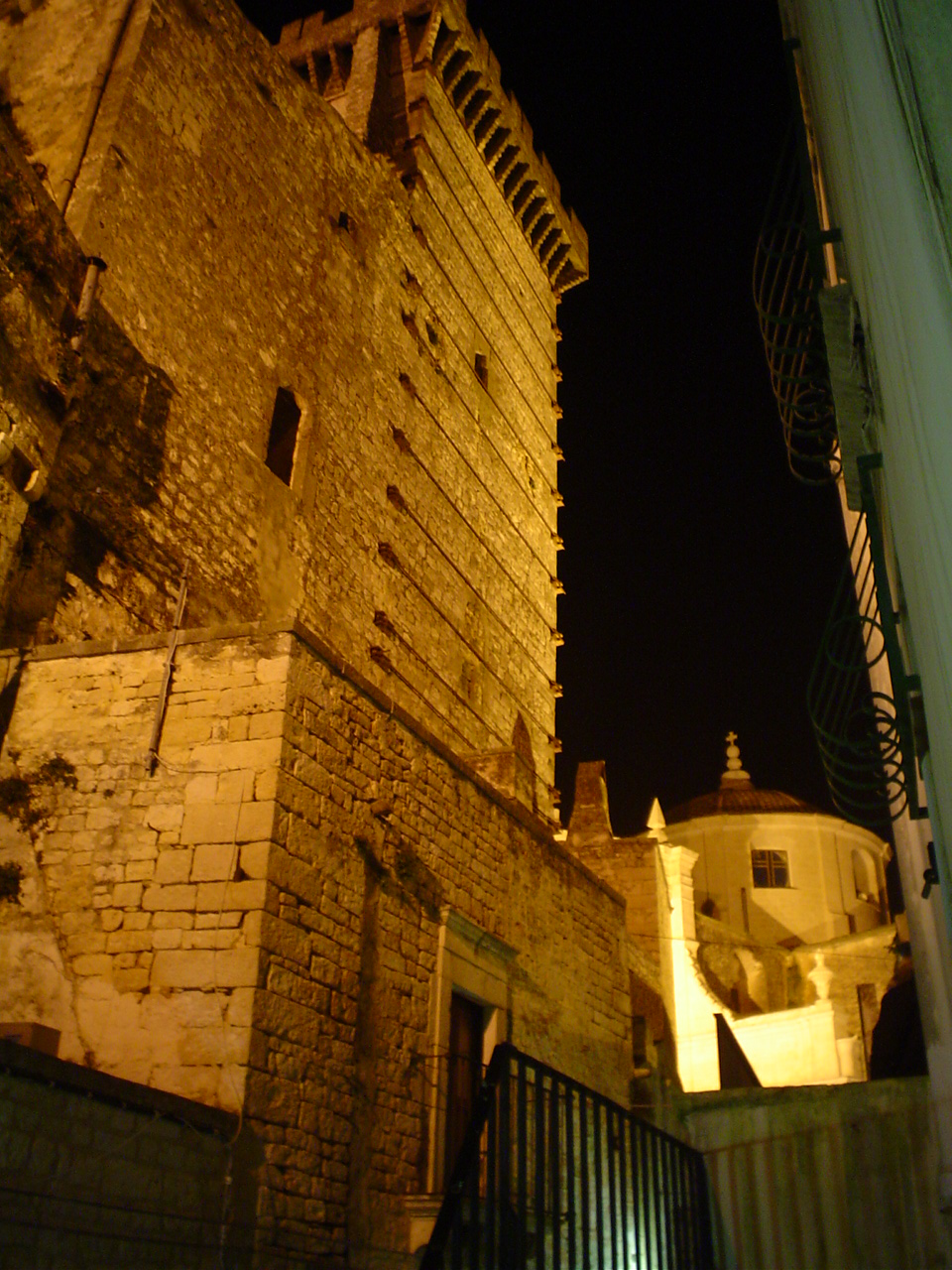 foto non professionali e assolutamente di pubblico dominio da me fatte in data 01/01/06